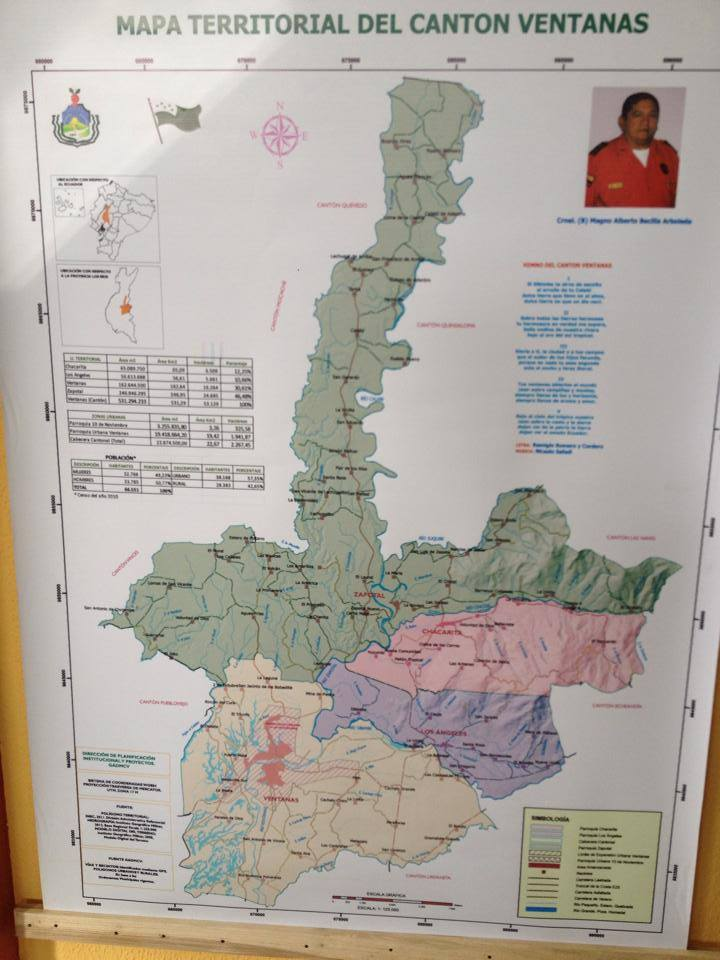 Mapa territorial de Ventanas